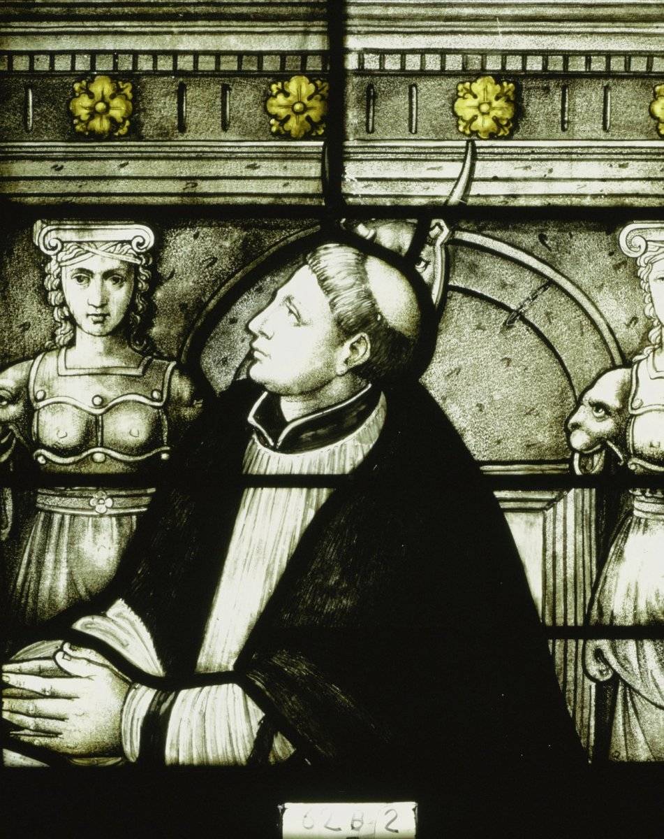 Sint Janskerk: interieur, glas in loodraam NR. 62, detail B 2